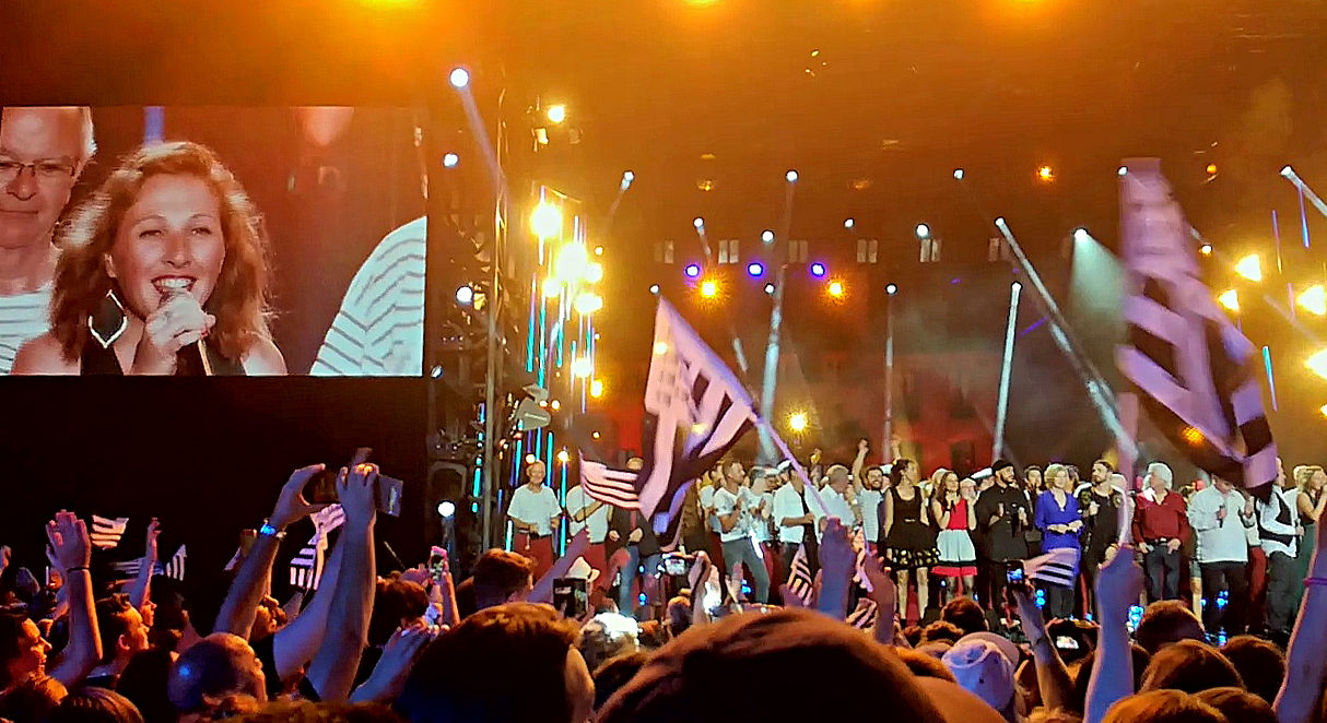 Rozenn Talec interprète en breton la chanson Les Copains d'abord avec l'ensemble des artistes du concert pour le tournage de l'émission de France 2, place Saint-Corentin à Quimper.